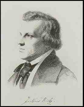 The image of German conductor and cellist Julius Rietz (1812-1877) Der deutsche Dirigent und Cellospieler Julius Rietz (1812–1877)